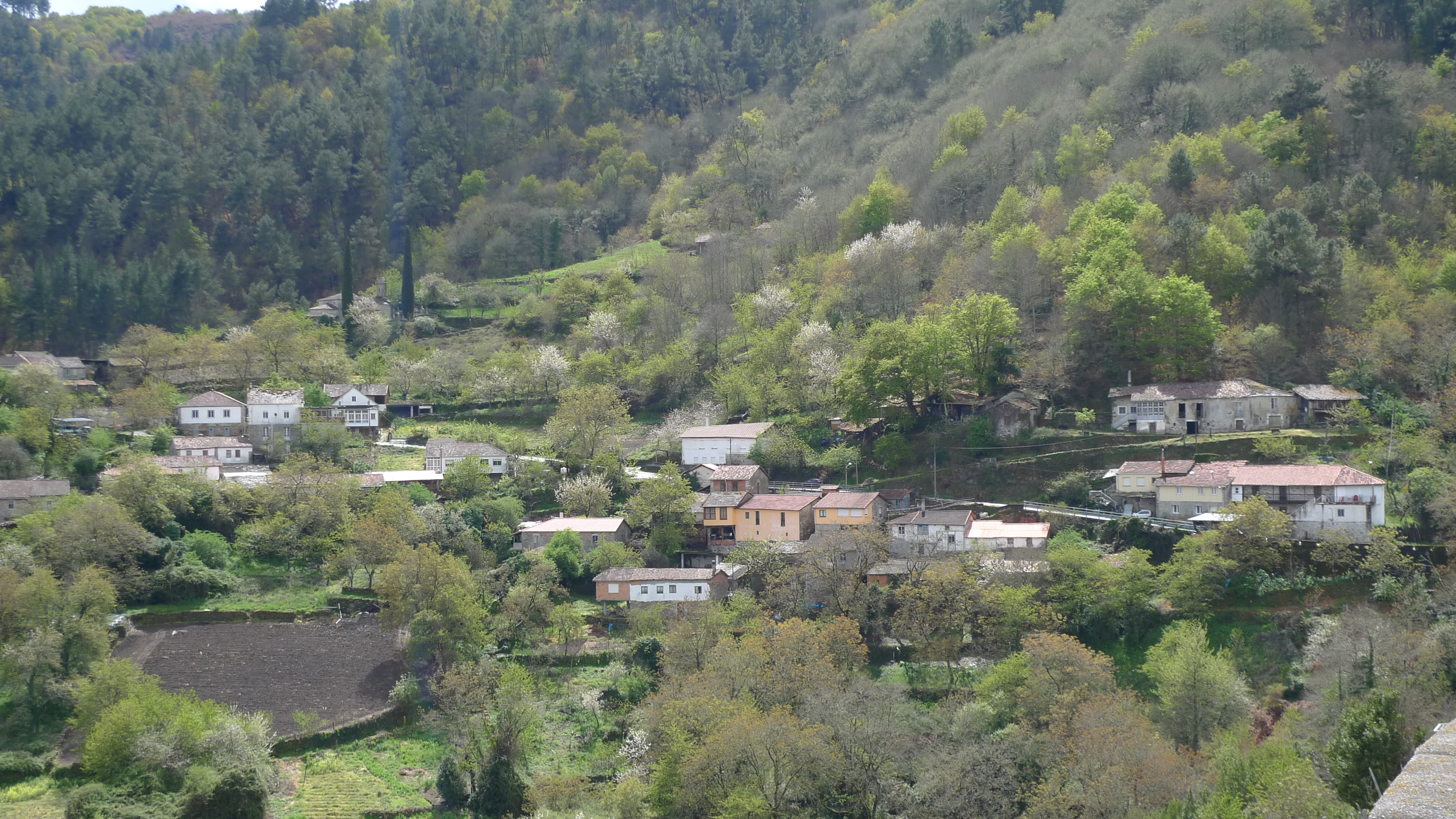 A Sariña - Chantada (Lugo)